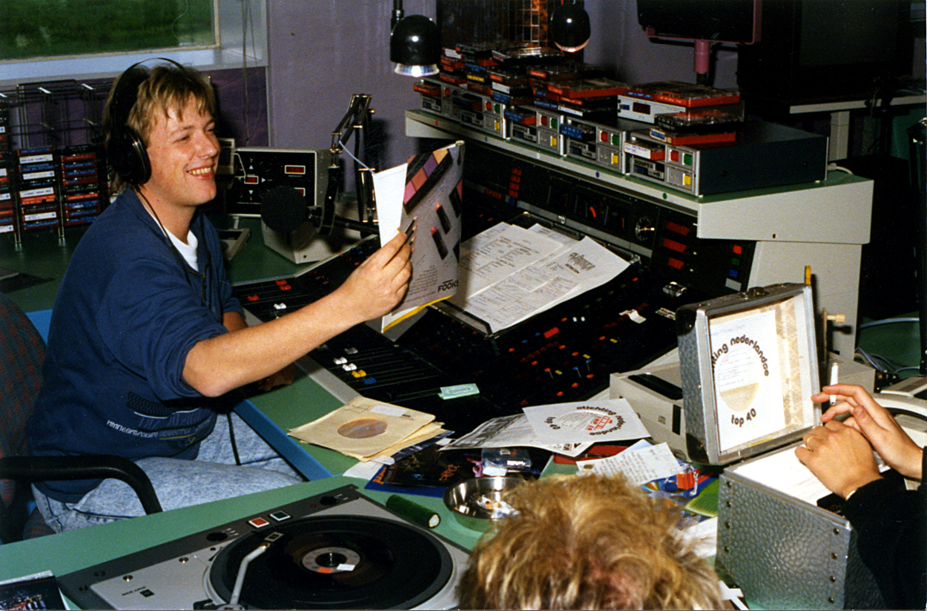 Description Bart van Leeuwen tijdens Bart en de Zwart, Veronica Radio 3, 1987 Date1987SourceOwn workAuthorRamon VasconcellosOther versions Bart van Leeuwen.jpg Bart van Leeuwen tijdens Bart en de Zwart, Veronica Radio 3, 1987